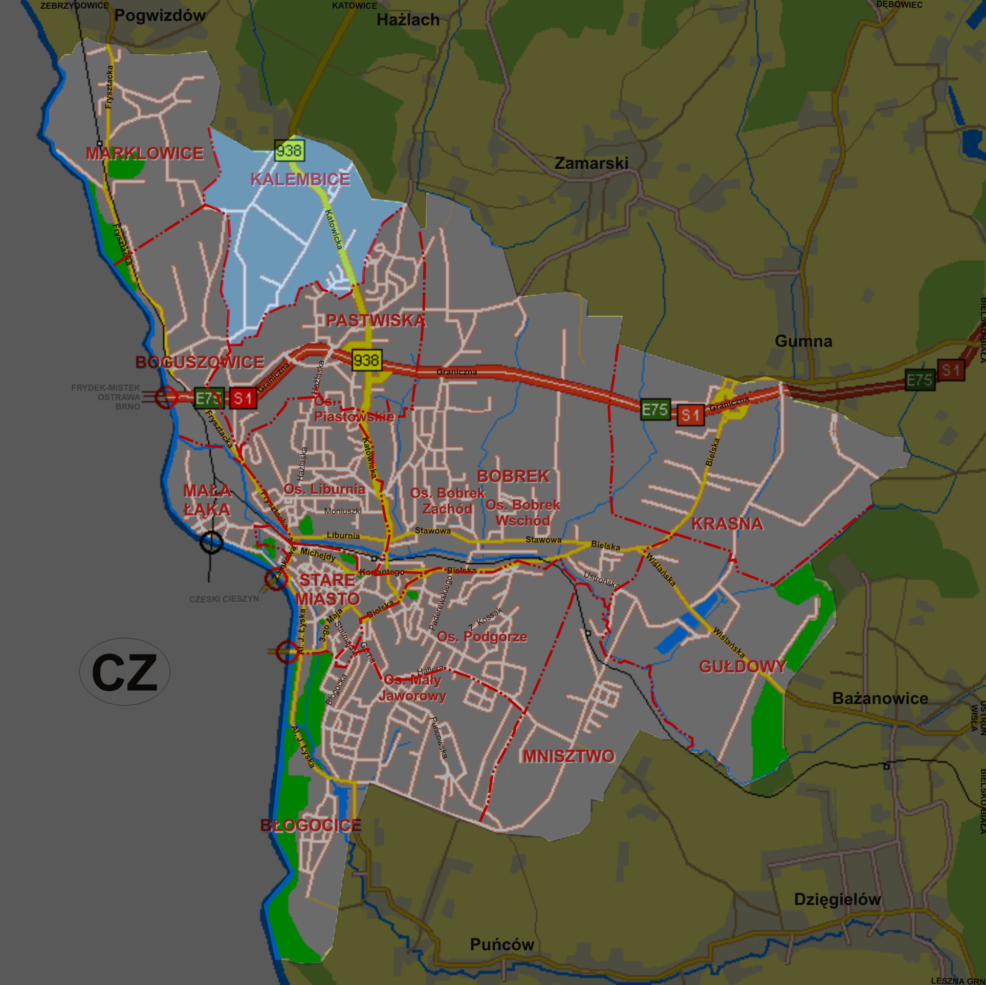 Kalembice, dzielnica Cieszyna